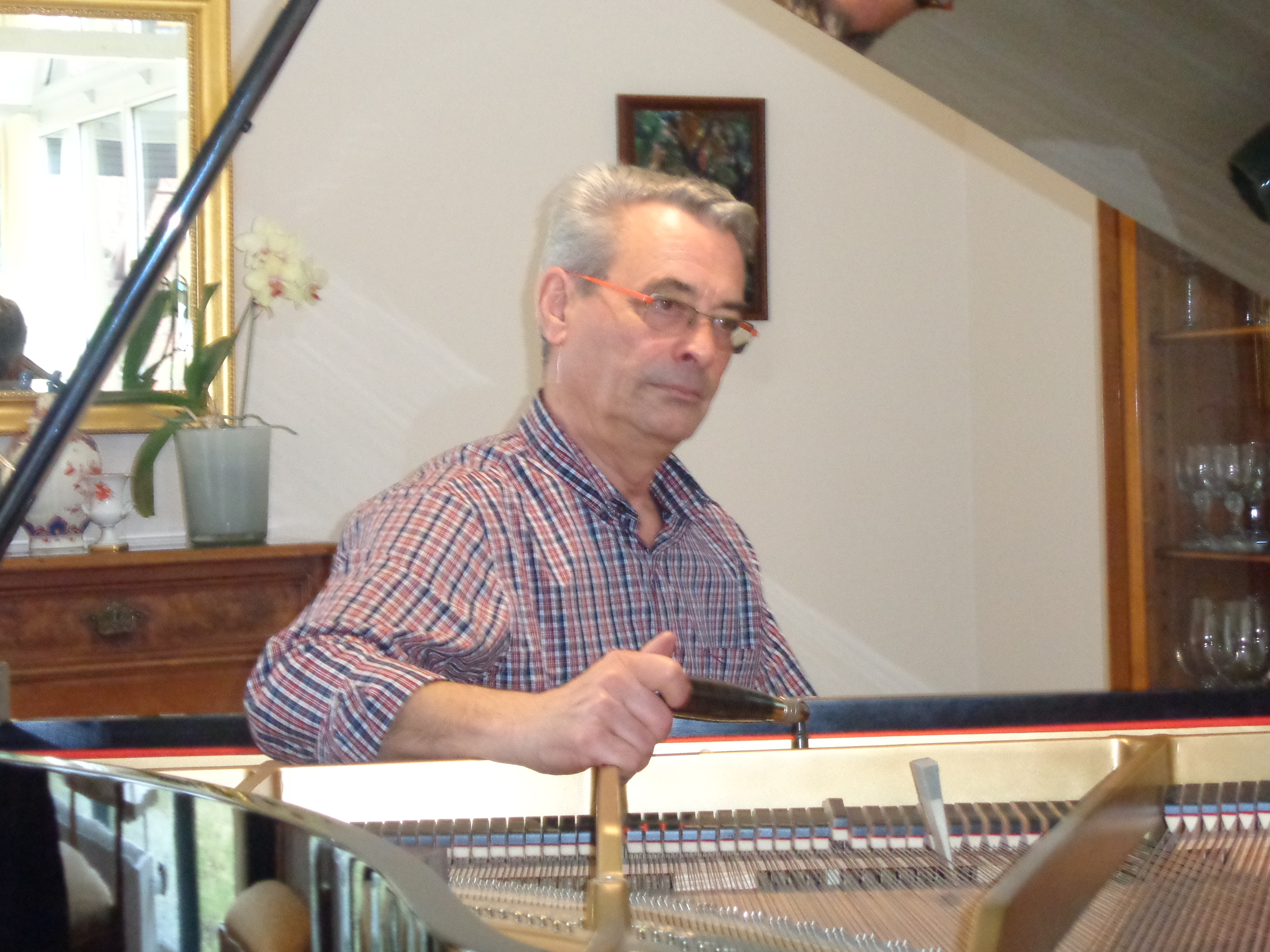 Matthias Kunze sen. beim Stimmen eines Flügels